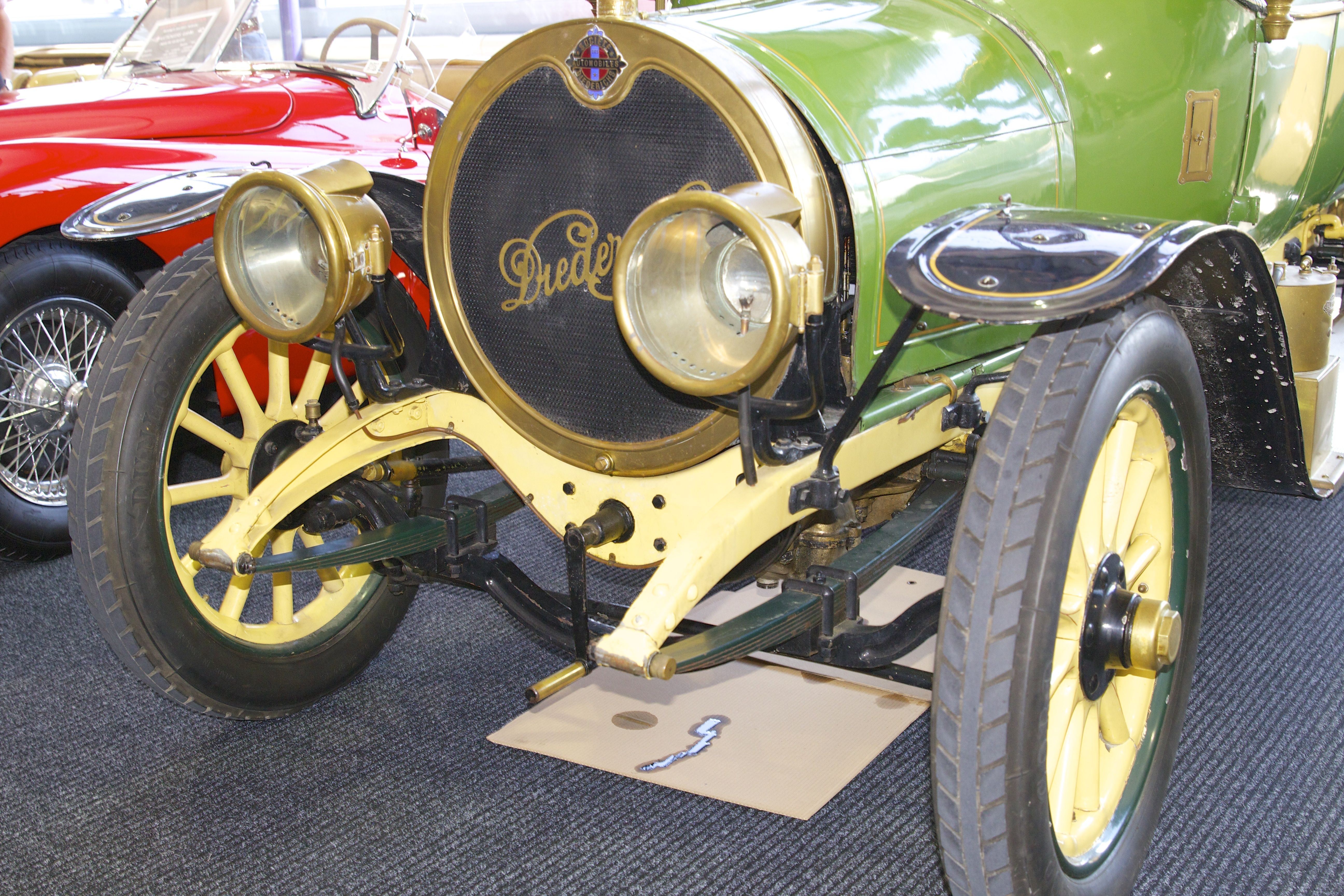 Societé Automobile Diederichs, Type LC Série 1, 1912